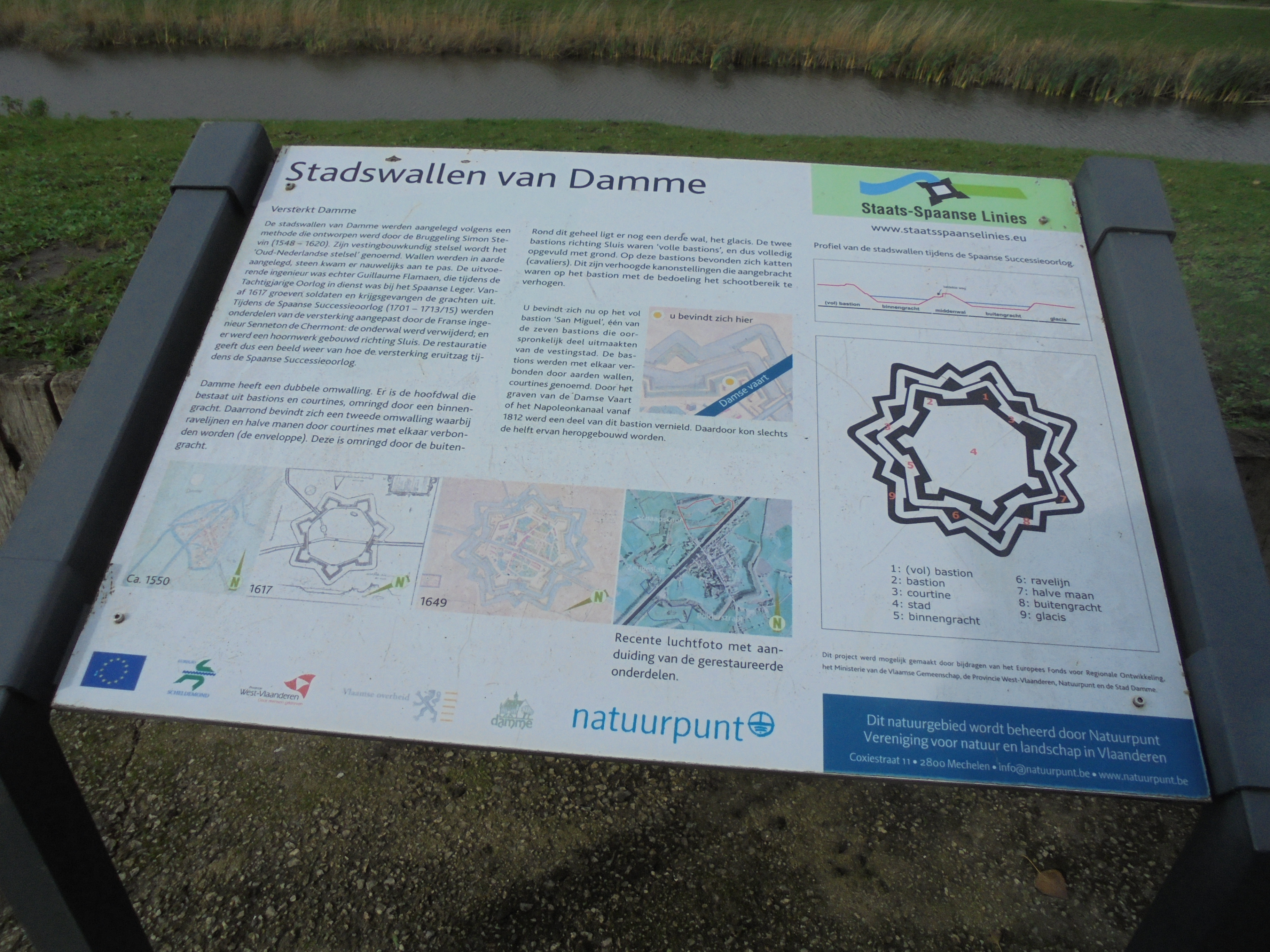 Stadswallen - Damme - West-Vlaanderen - België